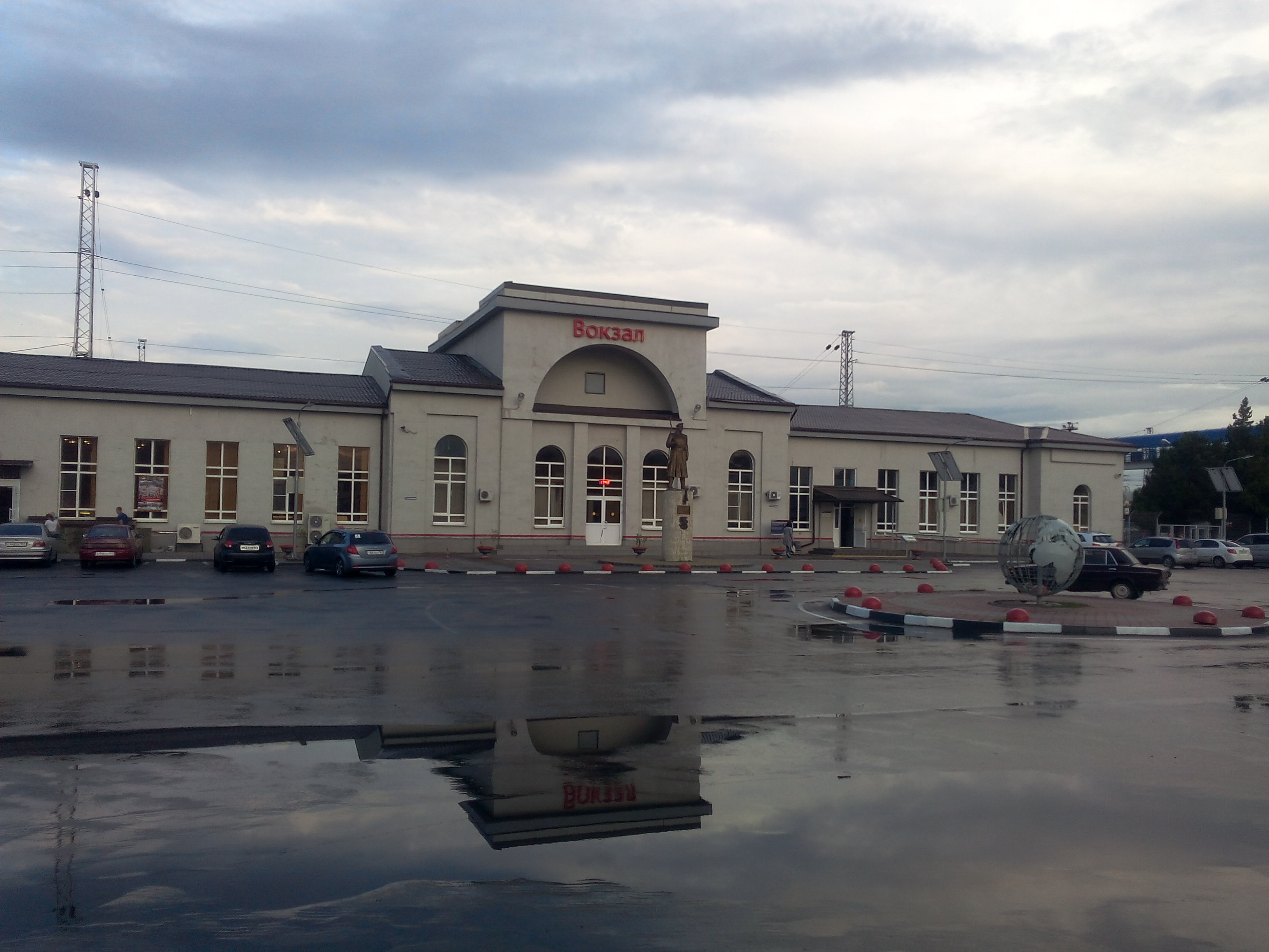 г. Батайск, площадь Привокзальная